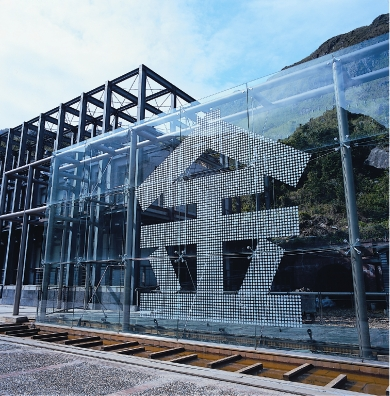 Gold Museum, New Taipei City Government黃金館。